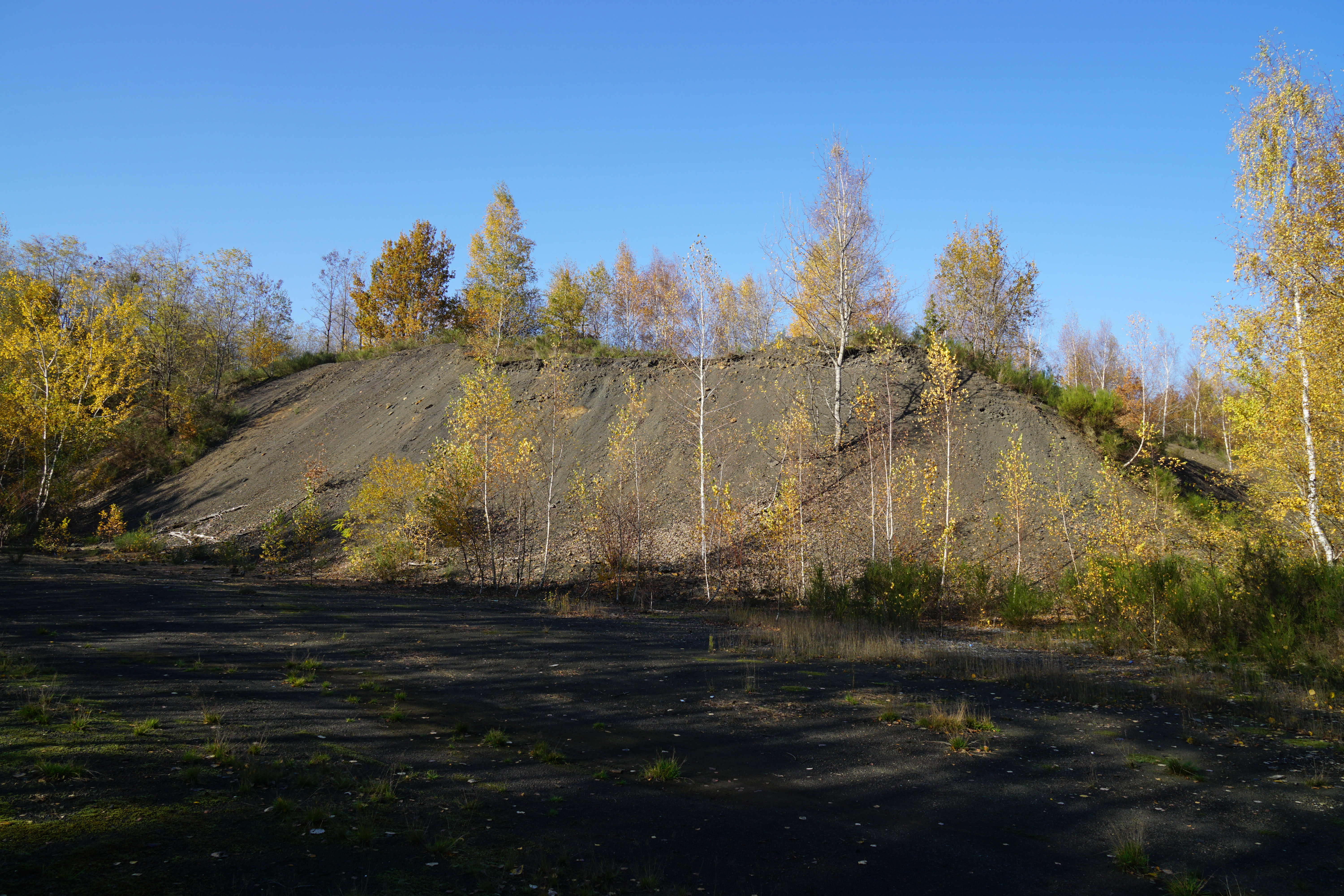 Le terril du puits Saint-Charles à Ronchamp (70).